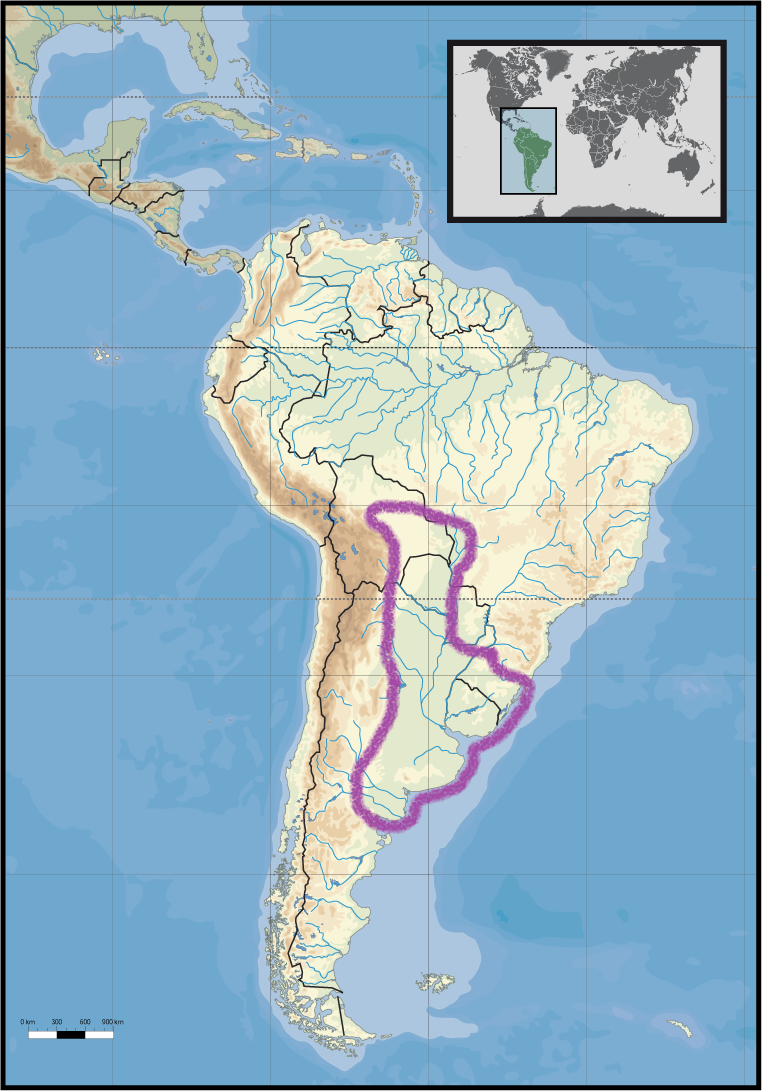 Mapa de localização aproximada da planície chaco-pampeana (ou planície platina), na América do Sul.